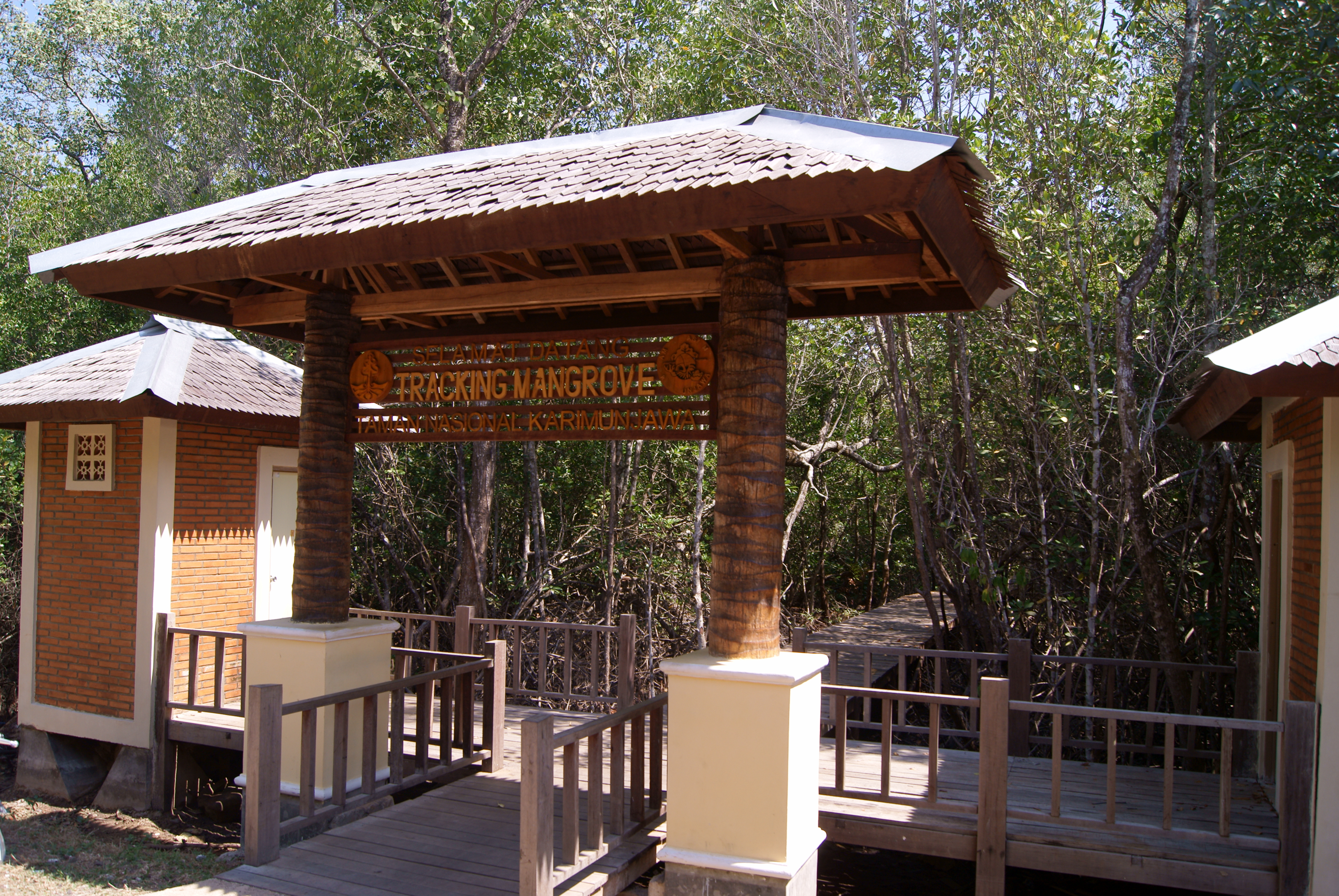 Jalur treking hutan bakau di Pulau Karimun Jawa